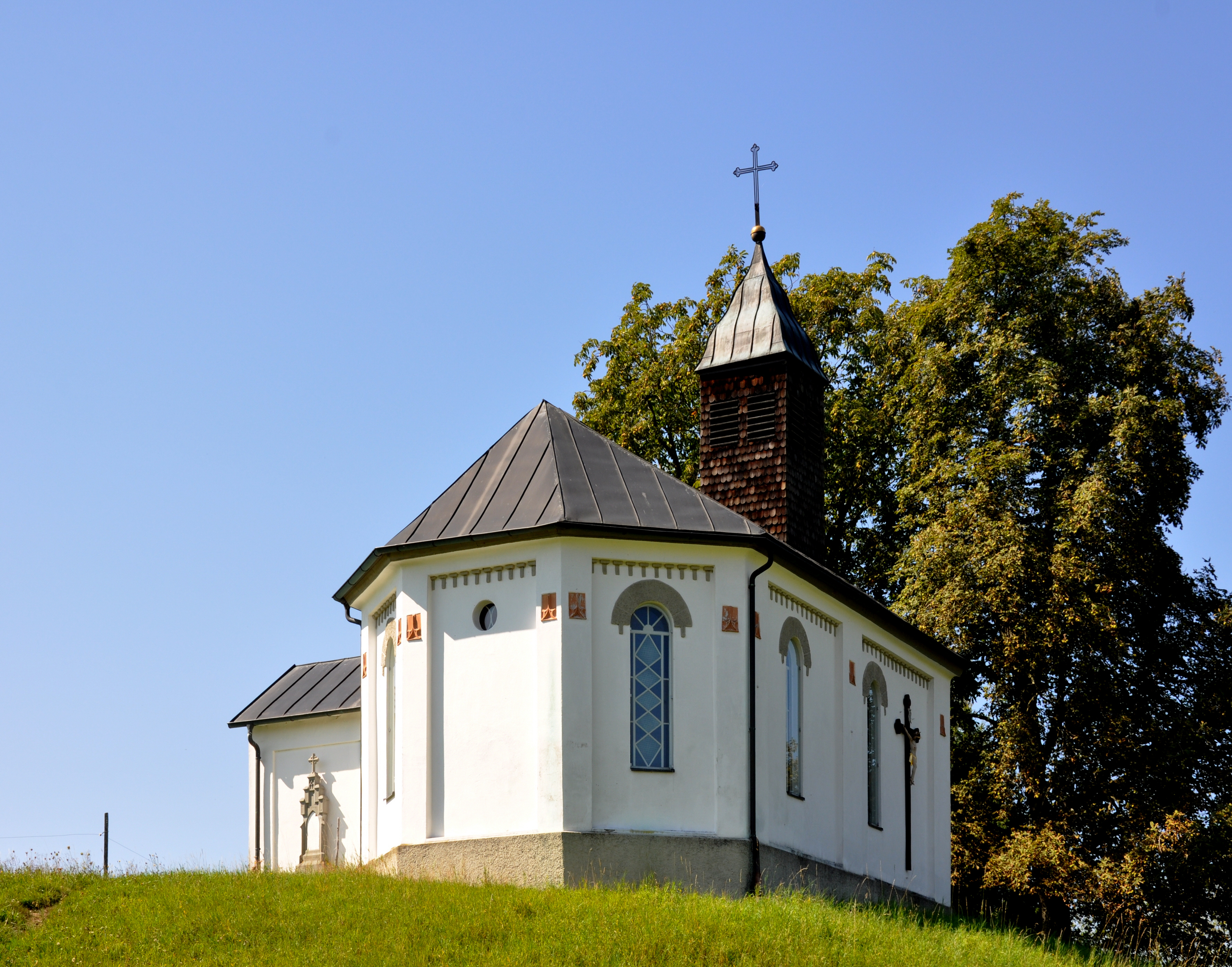 Bodnegg, Ortsteil Oberwagenbach, Kapelle St. Maria und Wendelin, erbaut 1866; Außenansicht